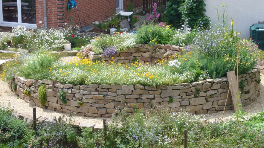 Hochbett aus Stein / Trockenmauer (bepflanzt mit Blumen)